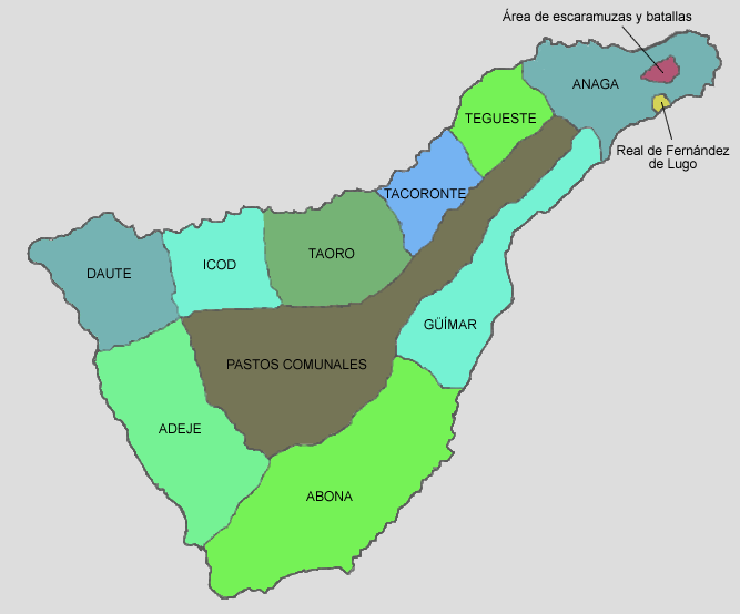 Mapa de Tenerife (Islas Canarias) previo a la conquista castellana